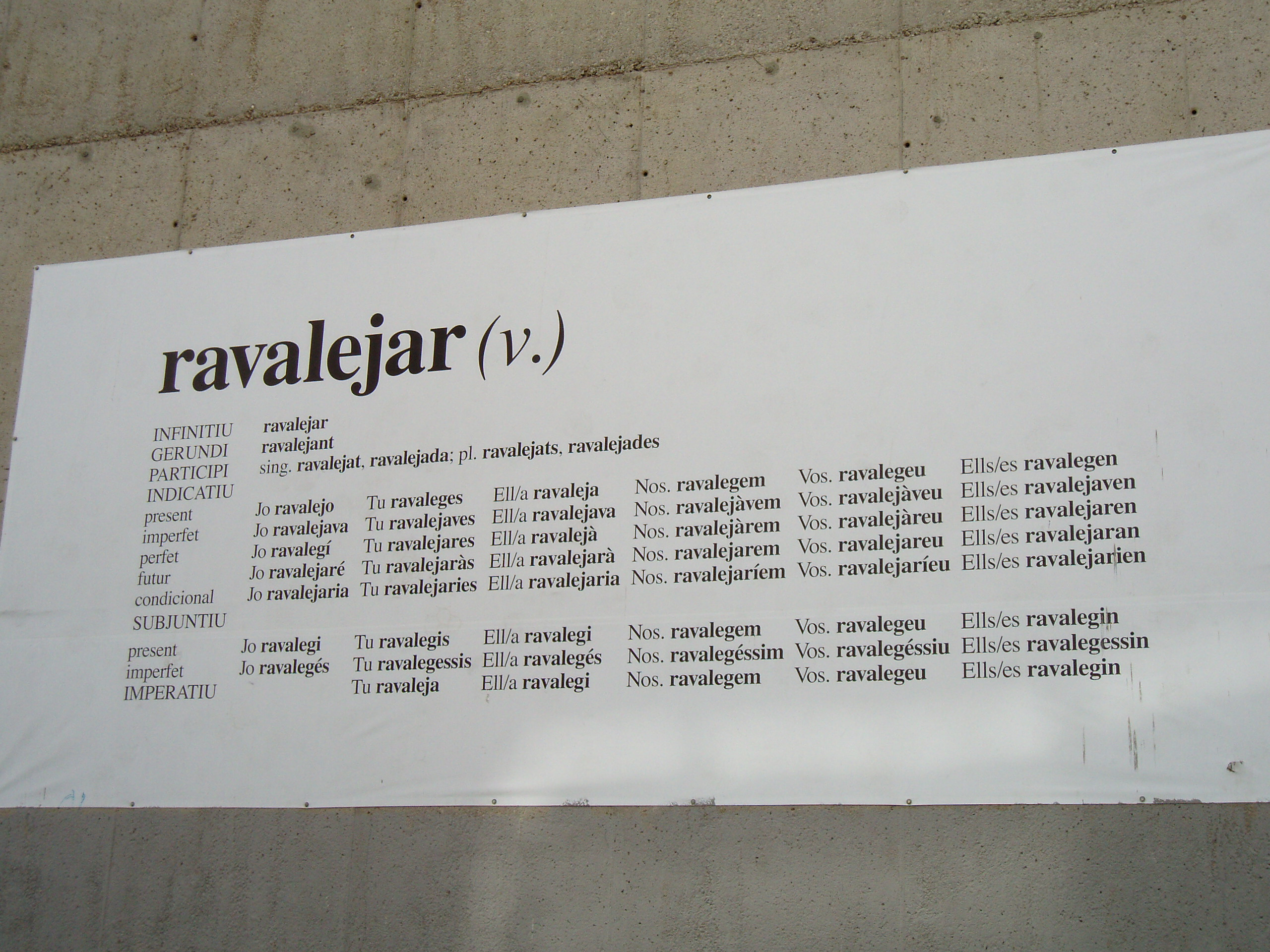 paradigm